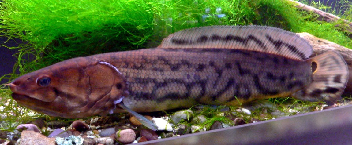 Amia calva. Amia calva